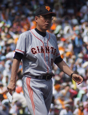 Giants_hara_88